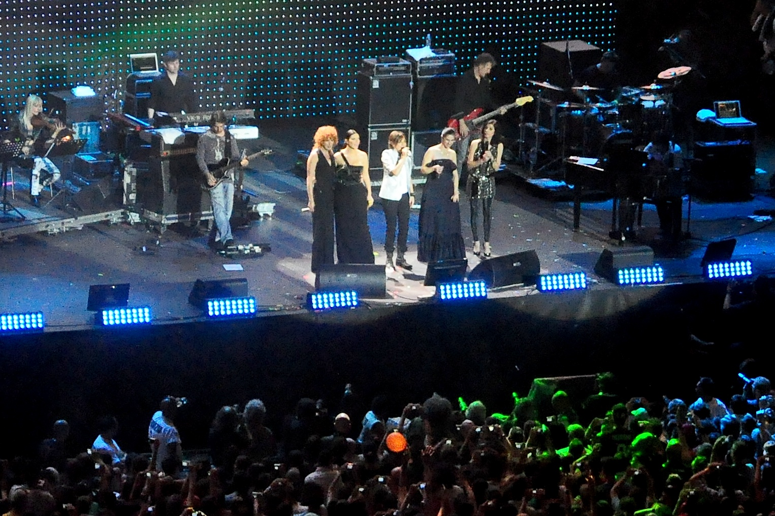 Fiorella Mannoia, Laura Pausini, Gianna Nannini, Elisa Toffoli, Giorgia Todrani, Amiche per l'Abruzzo, Stadio Giuseppe Meazza di San Siro a Milano, 21-06-2009